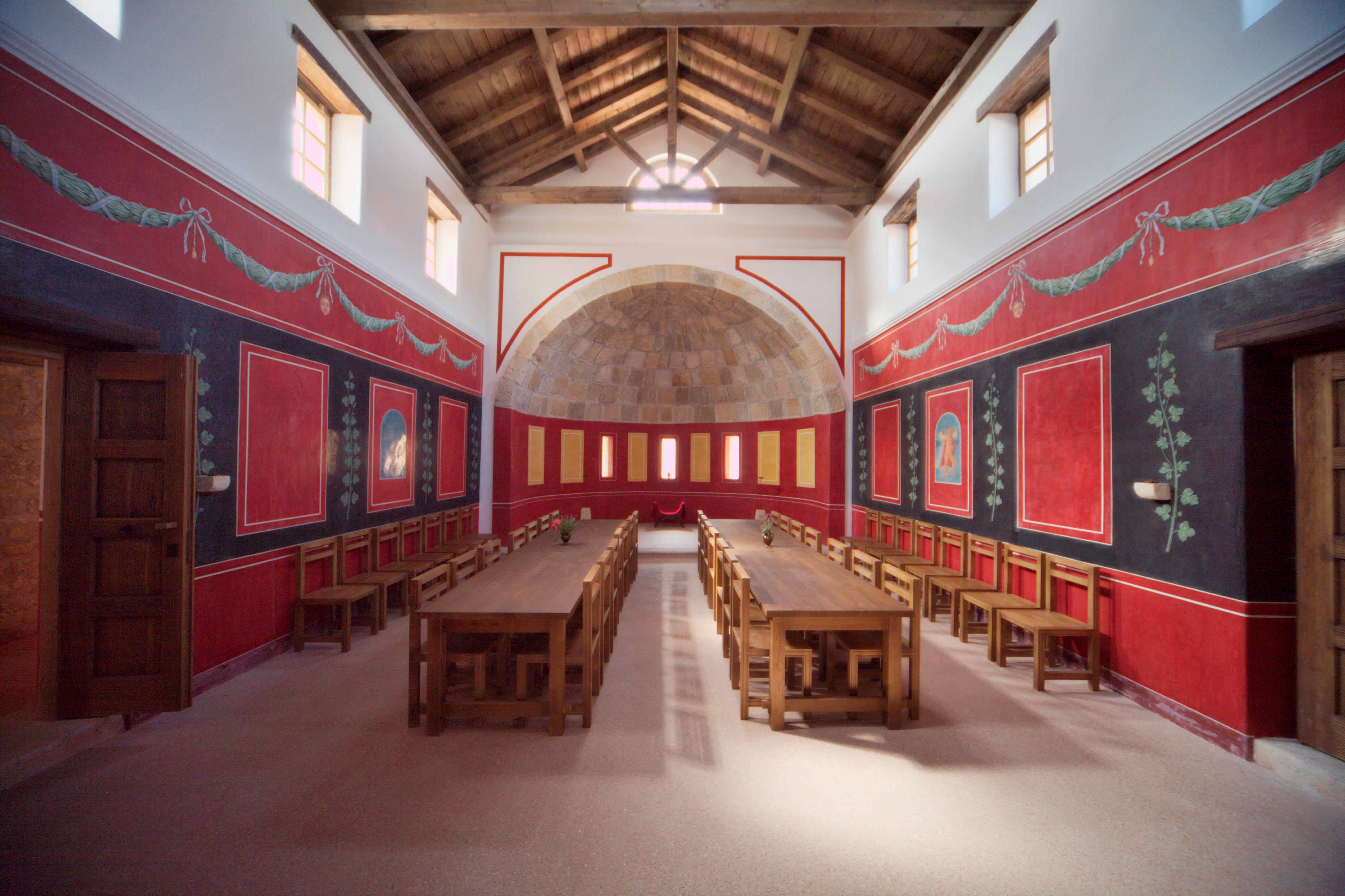 großer Apsidenraum (Repräsentationsraum) der Villa Urbana